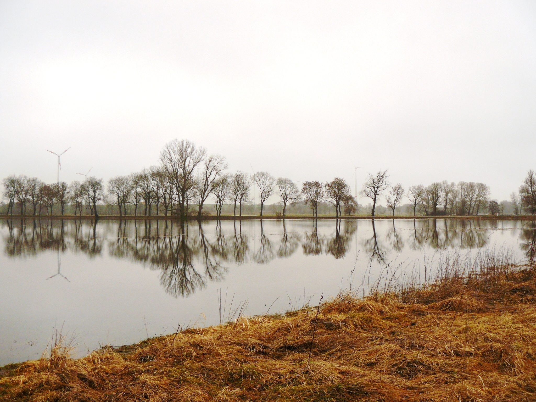 Ueckerüberschwemmung bei Nieden